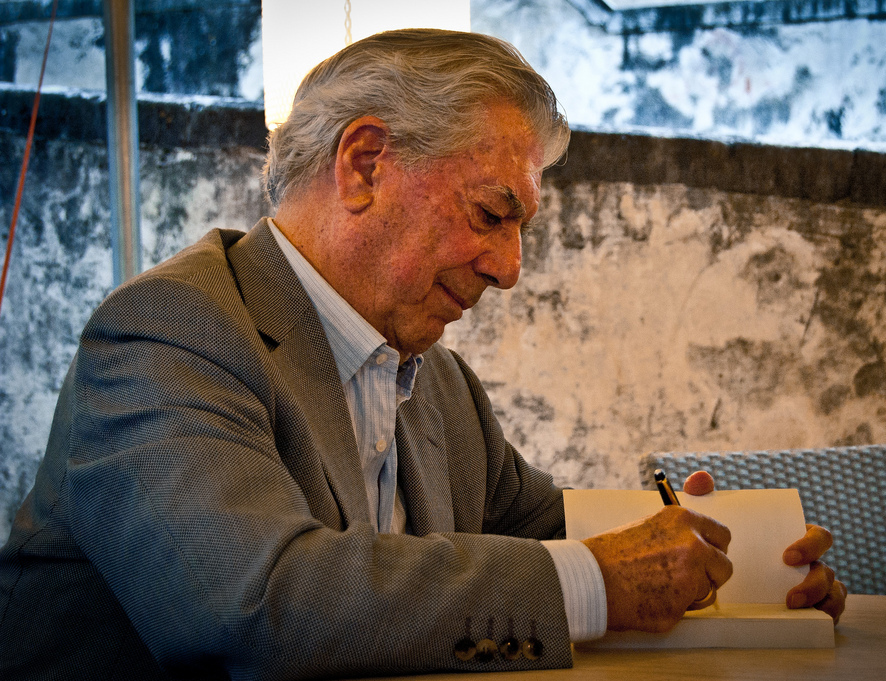 Mario Vargas Llosa in Pietrasanta, Toskana